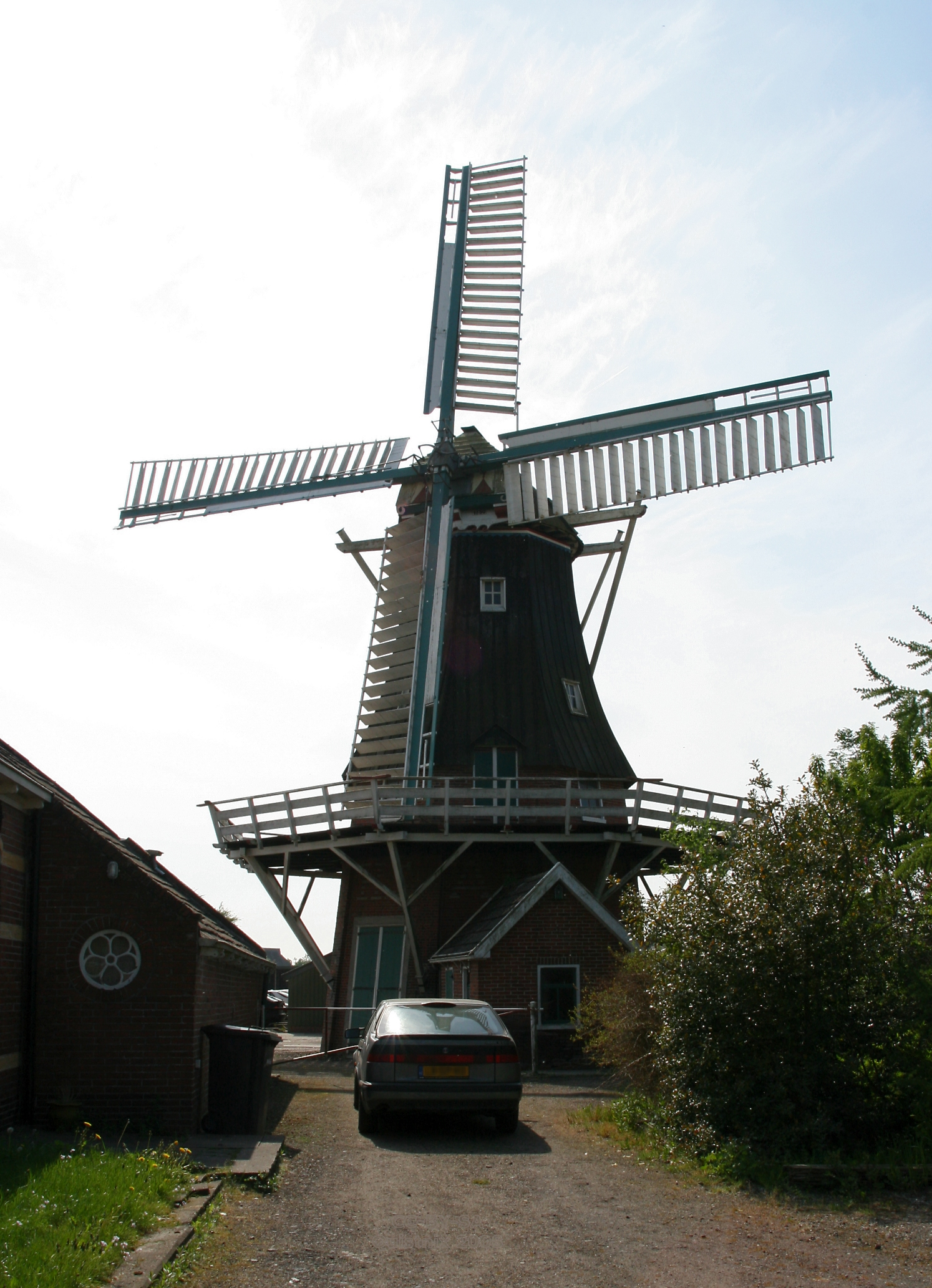 Overschild (Slochteren): molen Windlust